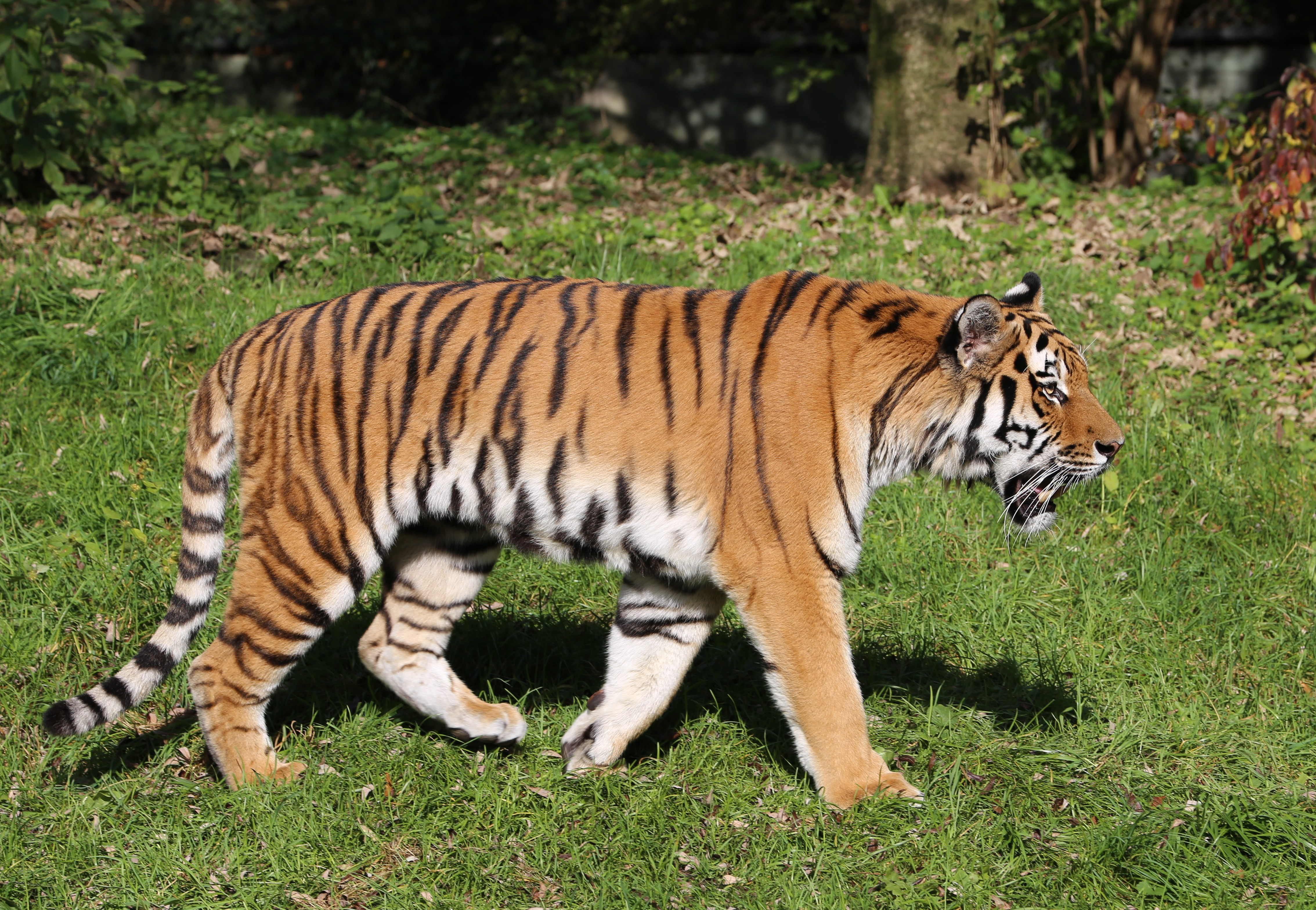 Sibirischer Tiger (Panthera tigris altaica), Tierpark Hellabrunn, München